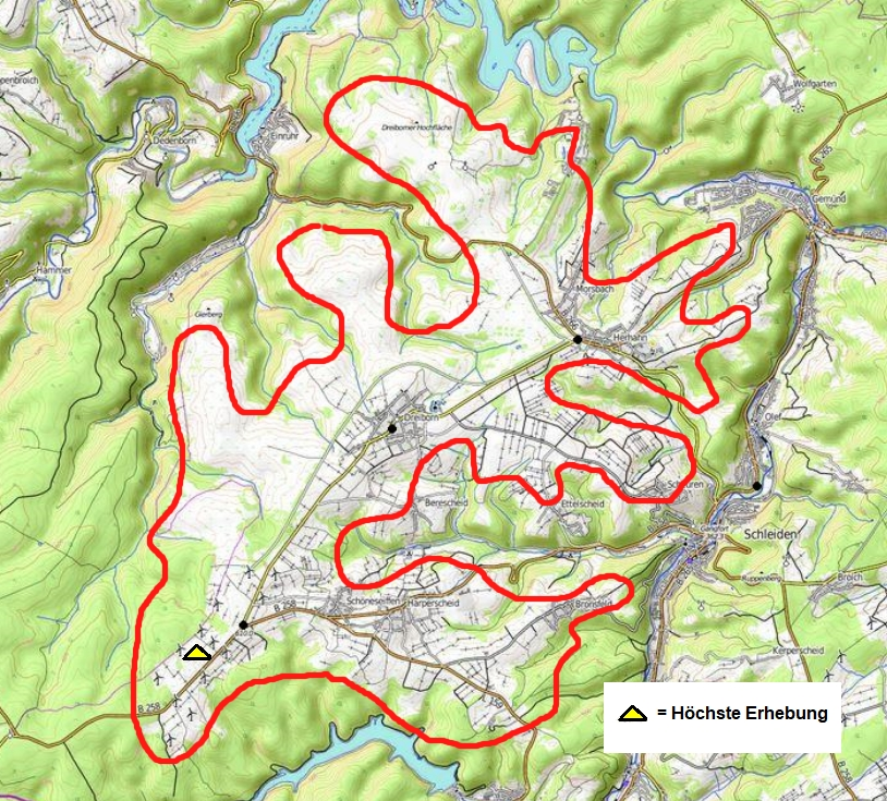 Geografische Darstellung der Dreiborner Hochfläche gem. Literatur. Autor=Ewald Gläßer, Herausgeber=Bundesforschungsanstalt für Landeskunde und Raumordnung,Titel:Die naturräumlichen Einheiten auf Blatt 122/123 Köln Aachen, Sammelwerk Geographische Landesaufnahme 1:200000 Naturräumliche Gliederung Deutschland, Selbstverlag, Bad Godesberg 1978 Karte Geographische Landesaufnahme, naturräumliche Gliederung, siehe hier Teil 282 bzw. 282.5